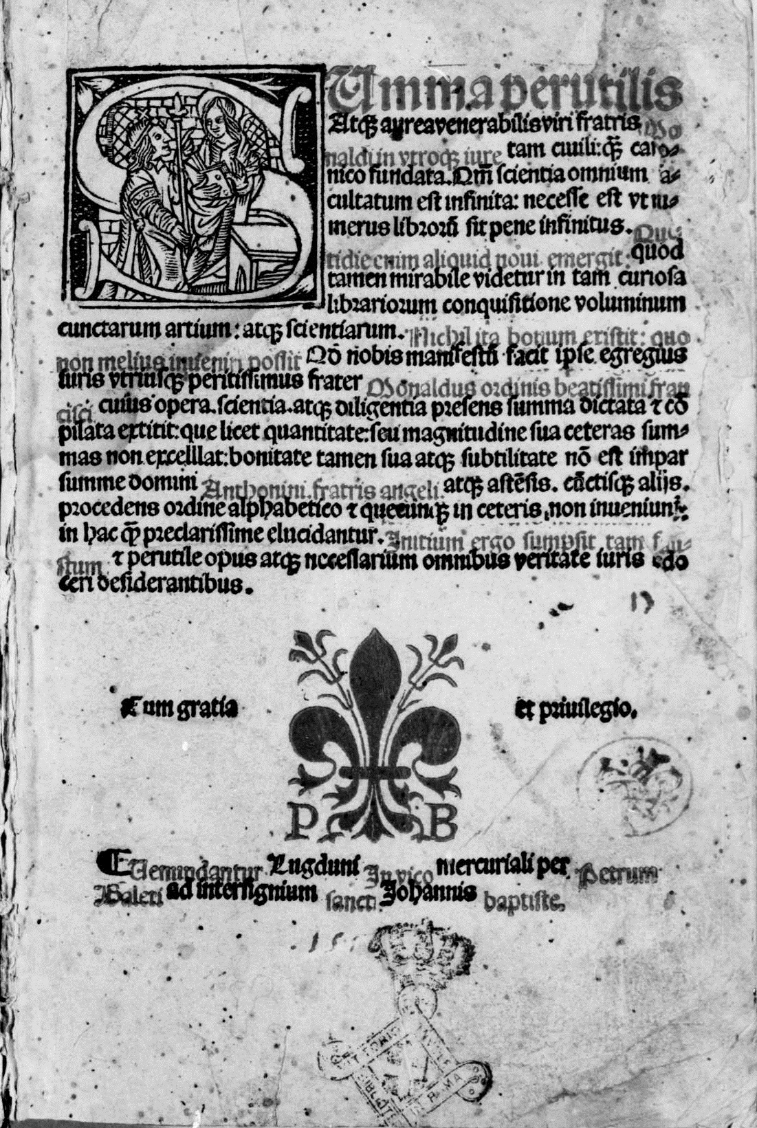 Frontespizio